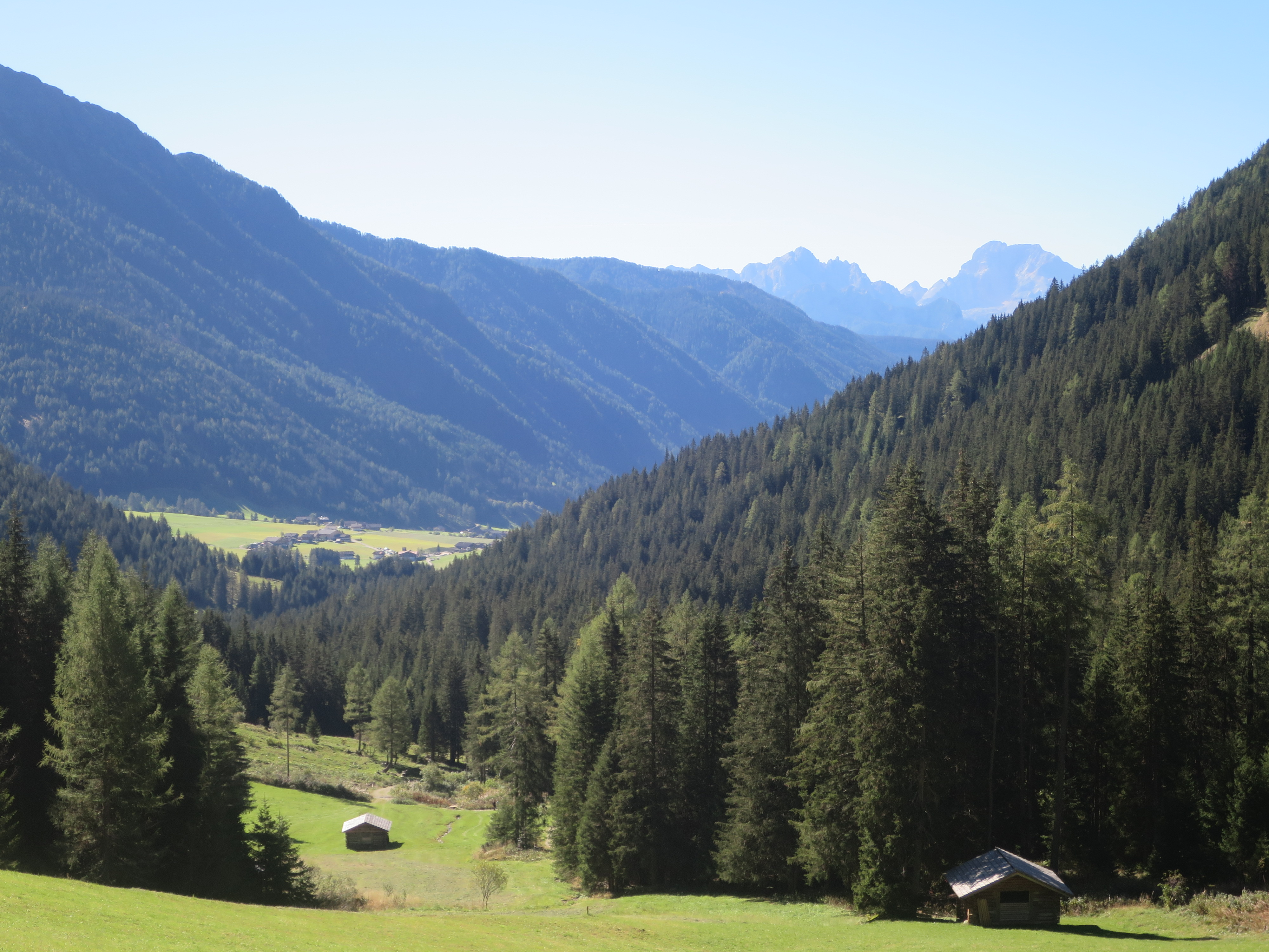 Blick von der Krahdorferalm ins Gsieser Tal.